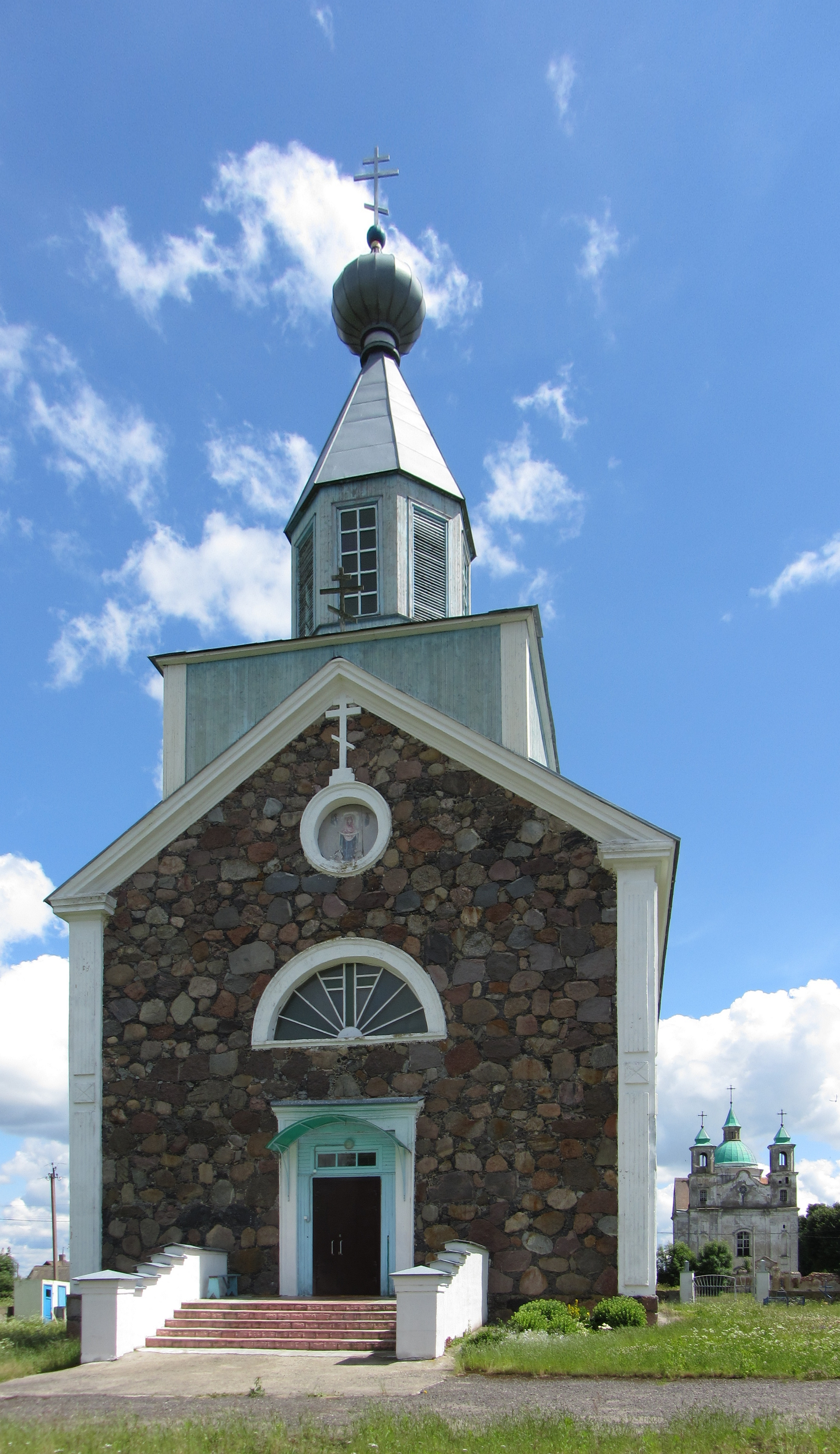 Беларуская (тарашкевіца): Царква Покрыва Прасьвятой Багародзіцы (1886) і Касьцёл Найсьвяцейшай Тройцы (1701—1704) у вёсцы Беніца